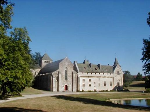 Description de l'image : l'Abbaye cistercienne de Loc-Dieu (Aveyron), vue de la facade ouest, avec l'étang créé par les moines Source : own work Statut : libre de droits